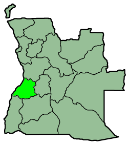 A map from province Benguela, Angola